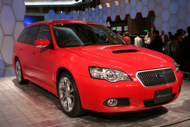 Subaru Legacy Blitzen 2006 model.